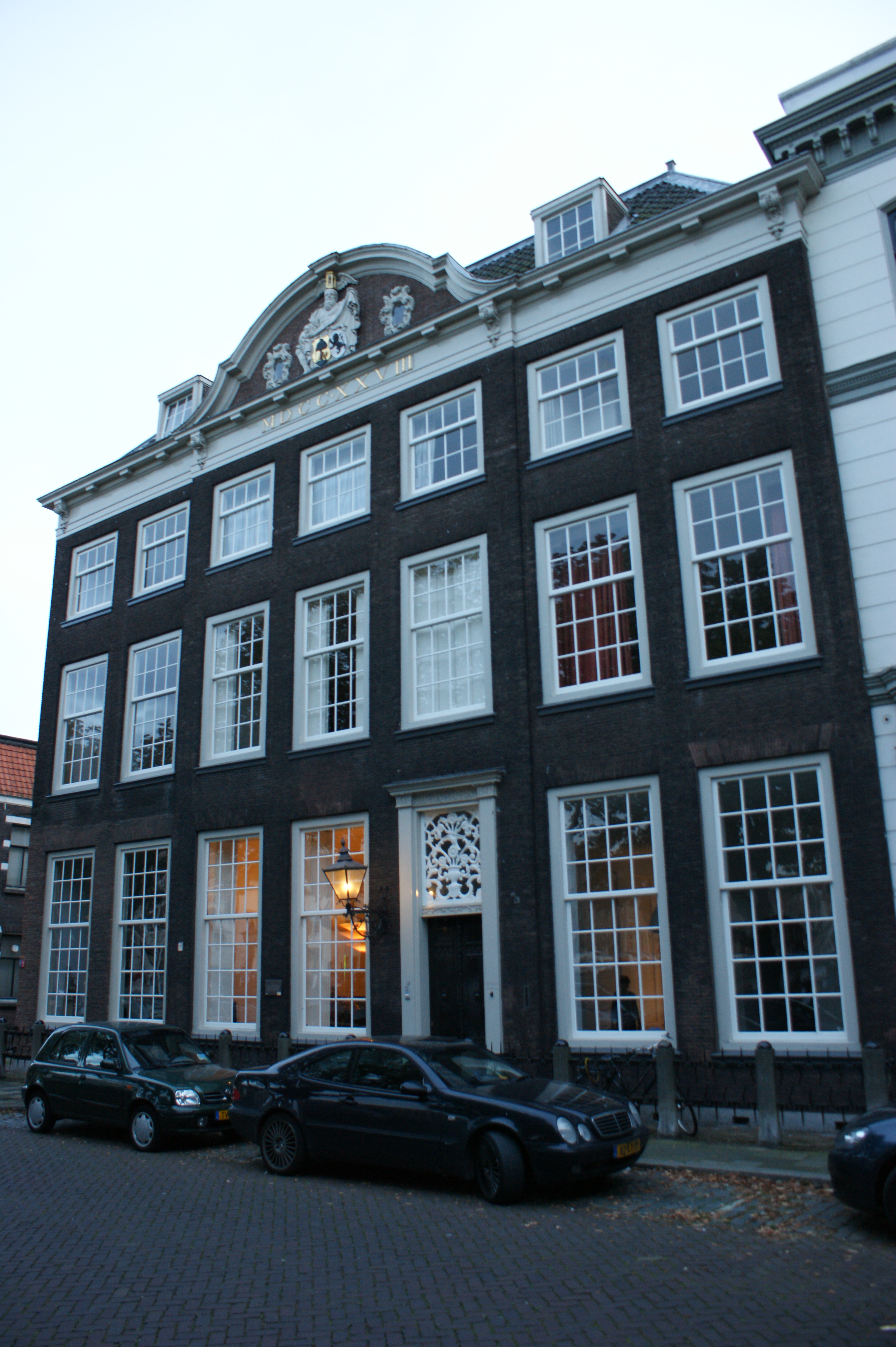 Dordrecht, Vlak